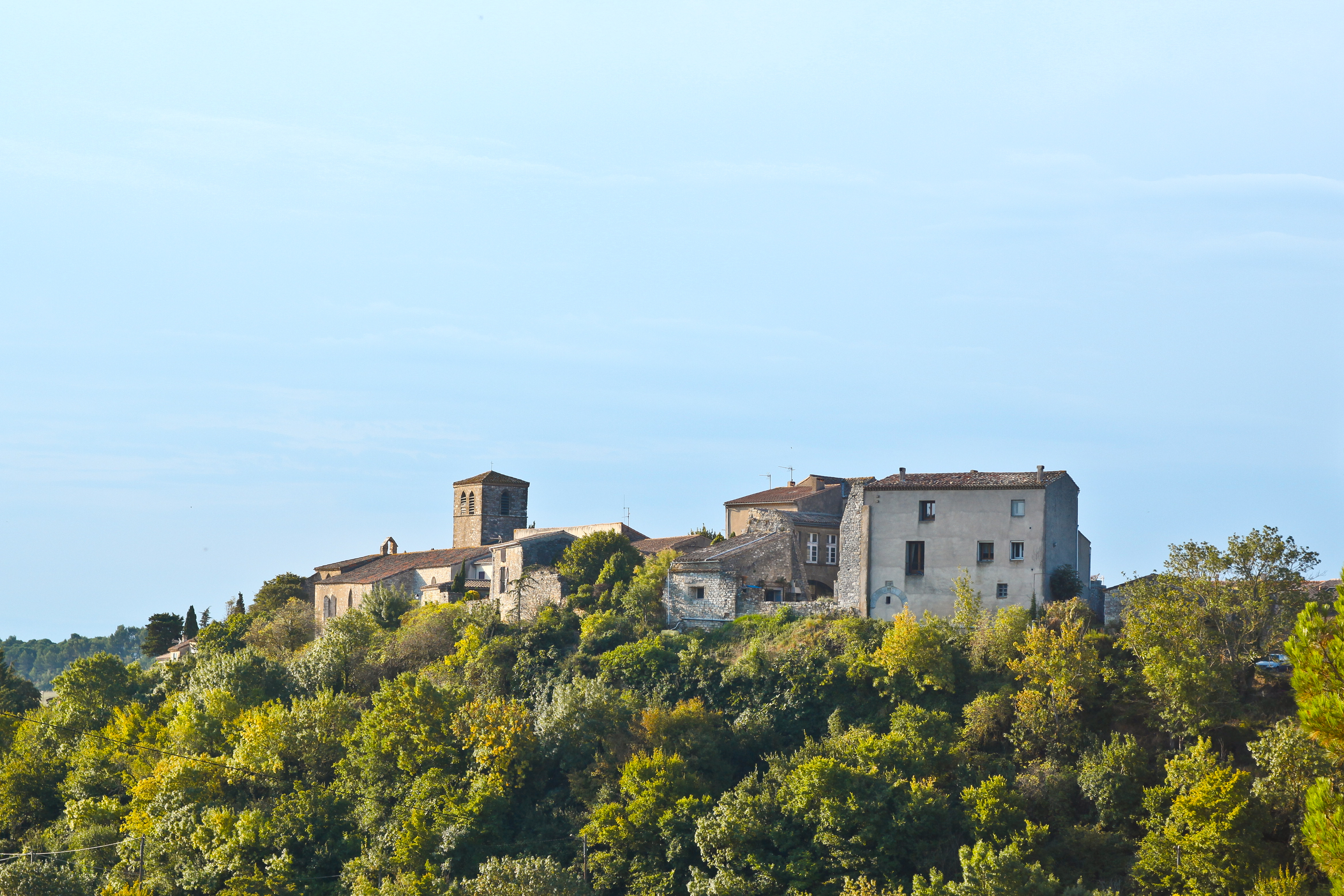 Vue générale du village d'Aragon